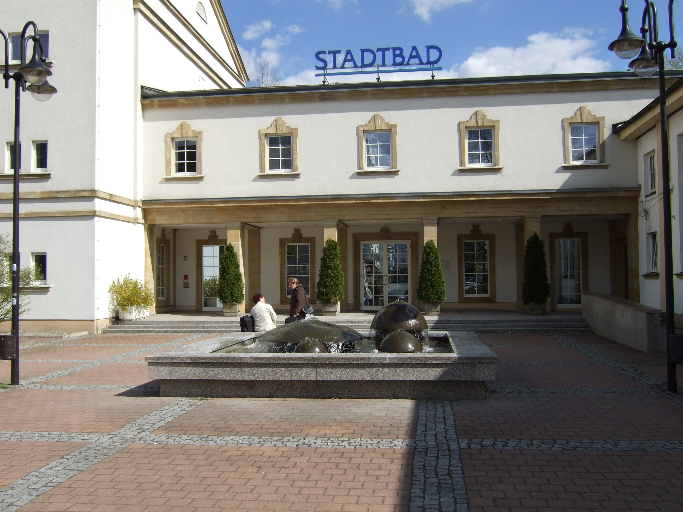 Stadtbad Bayreuth, Kolpingstraße 7